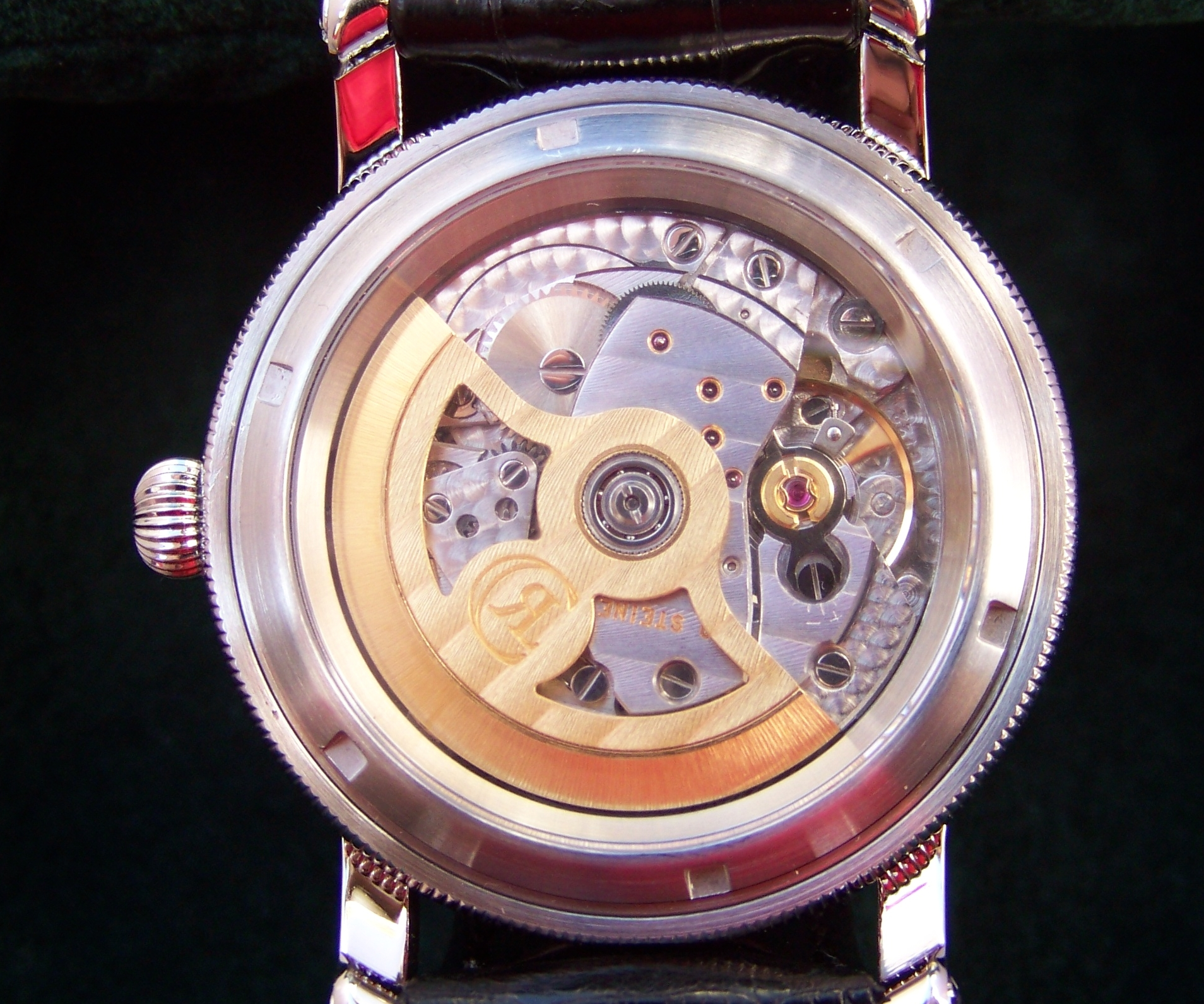 Chronoswiss Régulateur CH 1223 Stahl Saphirglasboden Werk Chronoswiss Kaliber C.122, Basiskaliber Enicar mit skelettiertem Rotor